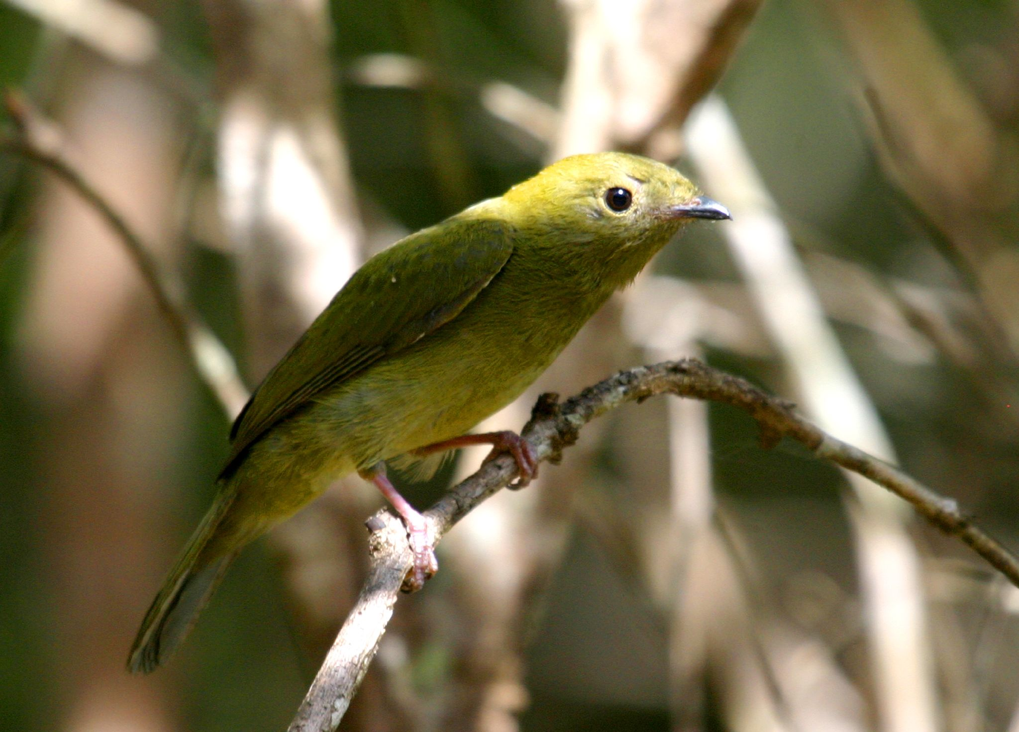 Helmeted Manakin (Antilophia galeata) female. "Jardim Botânico, Brasília (DF), Brasil."